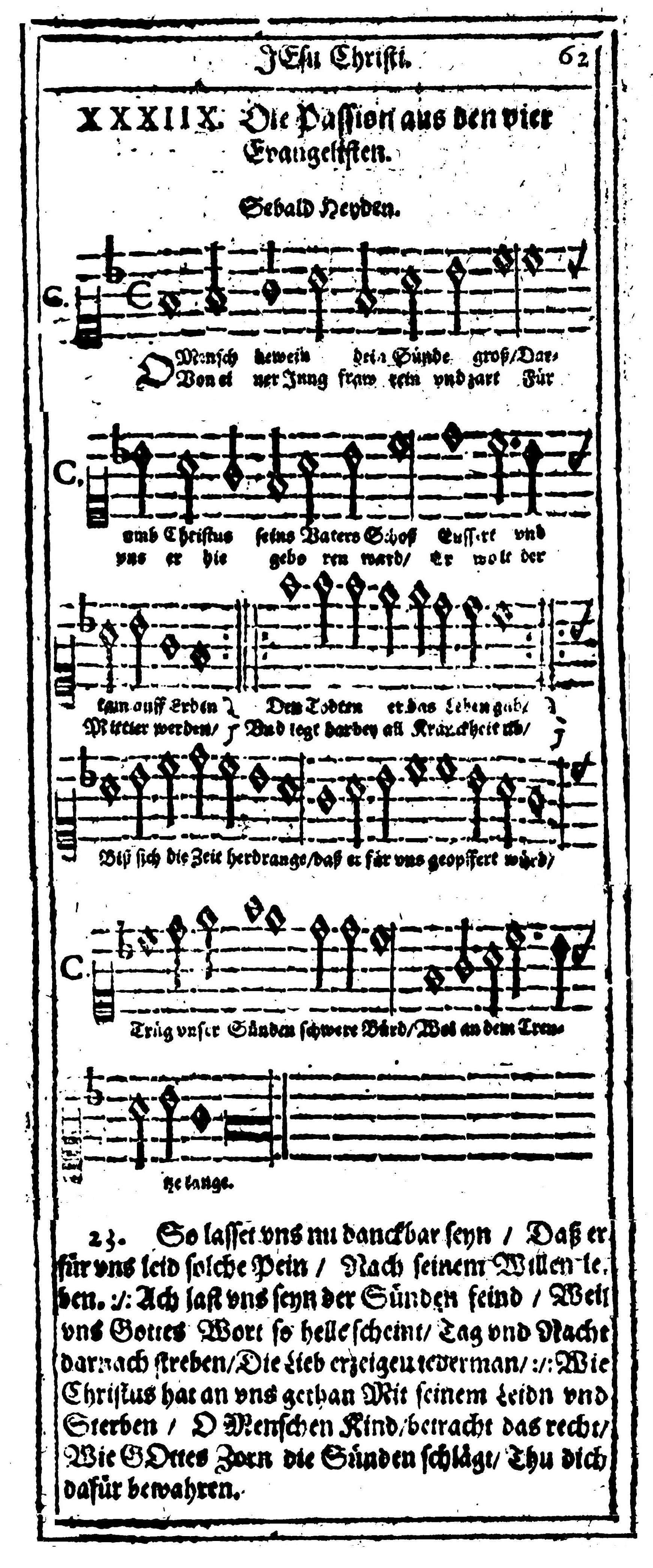 Sebald Heyden: O Mensch, bewein dein Sünde groß, erste und letzte Strophe seiner Großen Passion